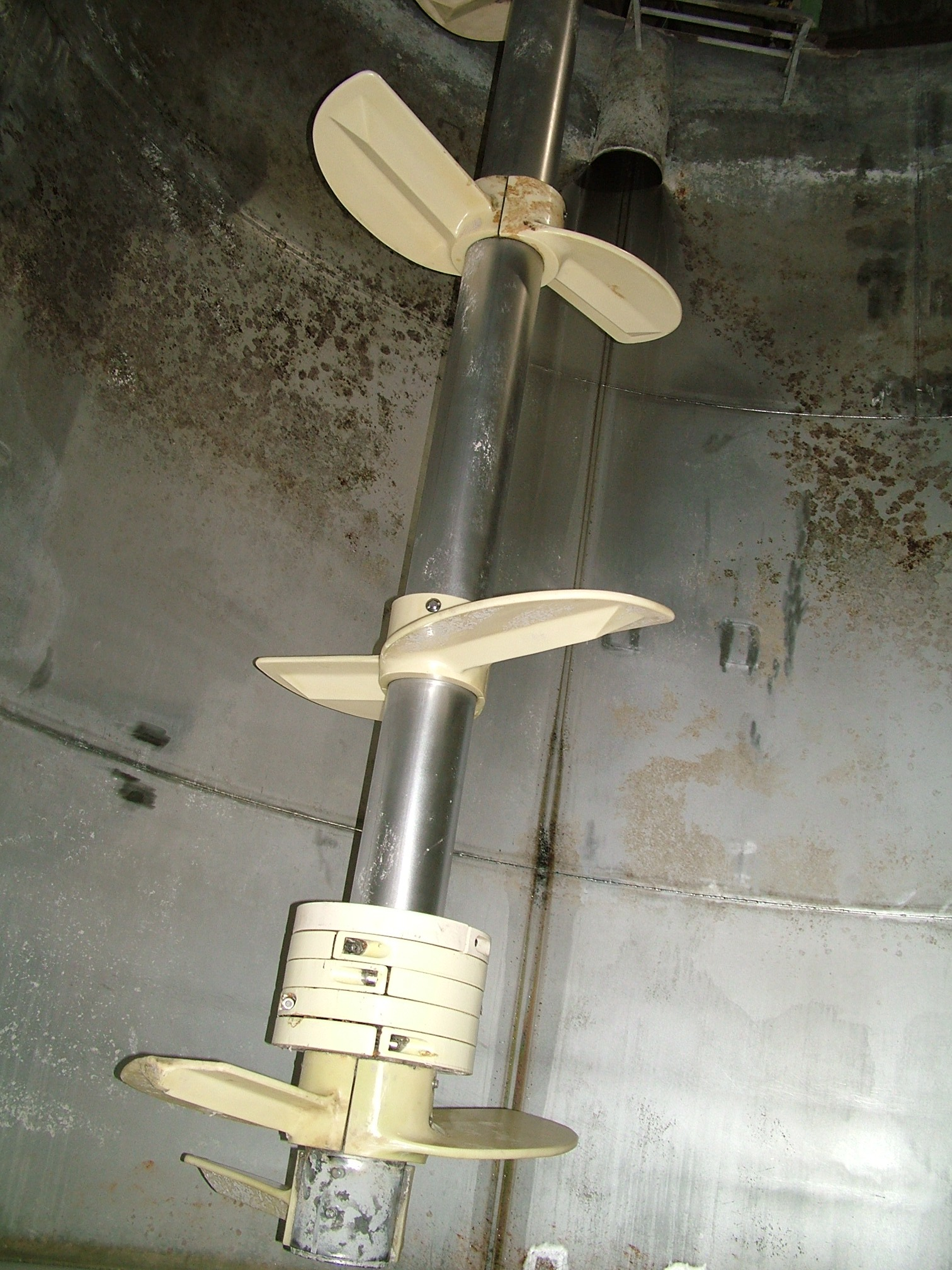 Roerwerk gebruikt in papierindustrie